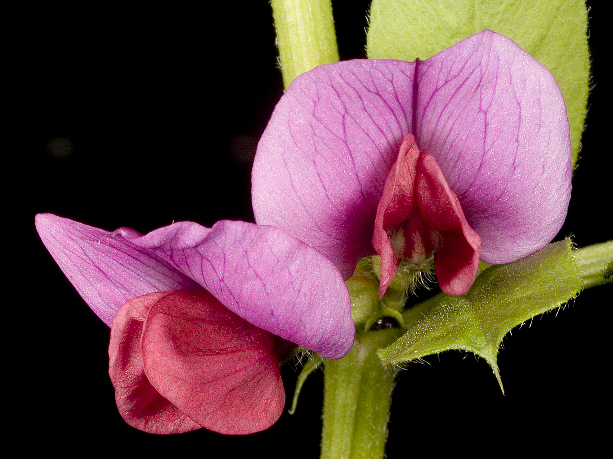 KRT3799